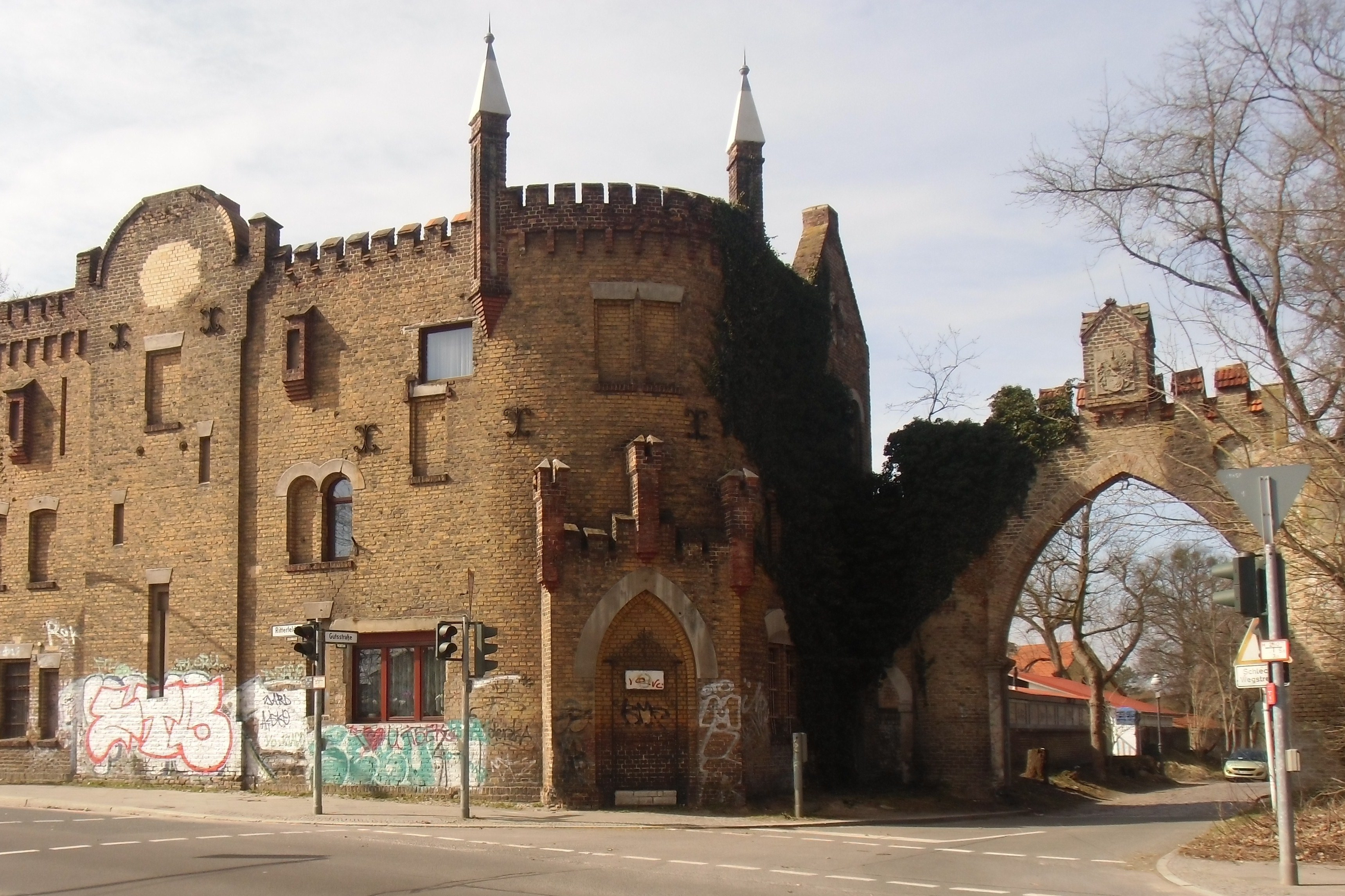 Spandauer Tor in Berlin-Kladow zum denkmalgeschützten Gutspark Groß Glienicke, Gutsstraße Ecke Ritterfelddamm